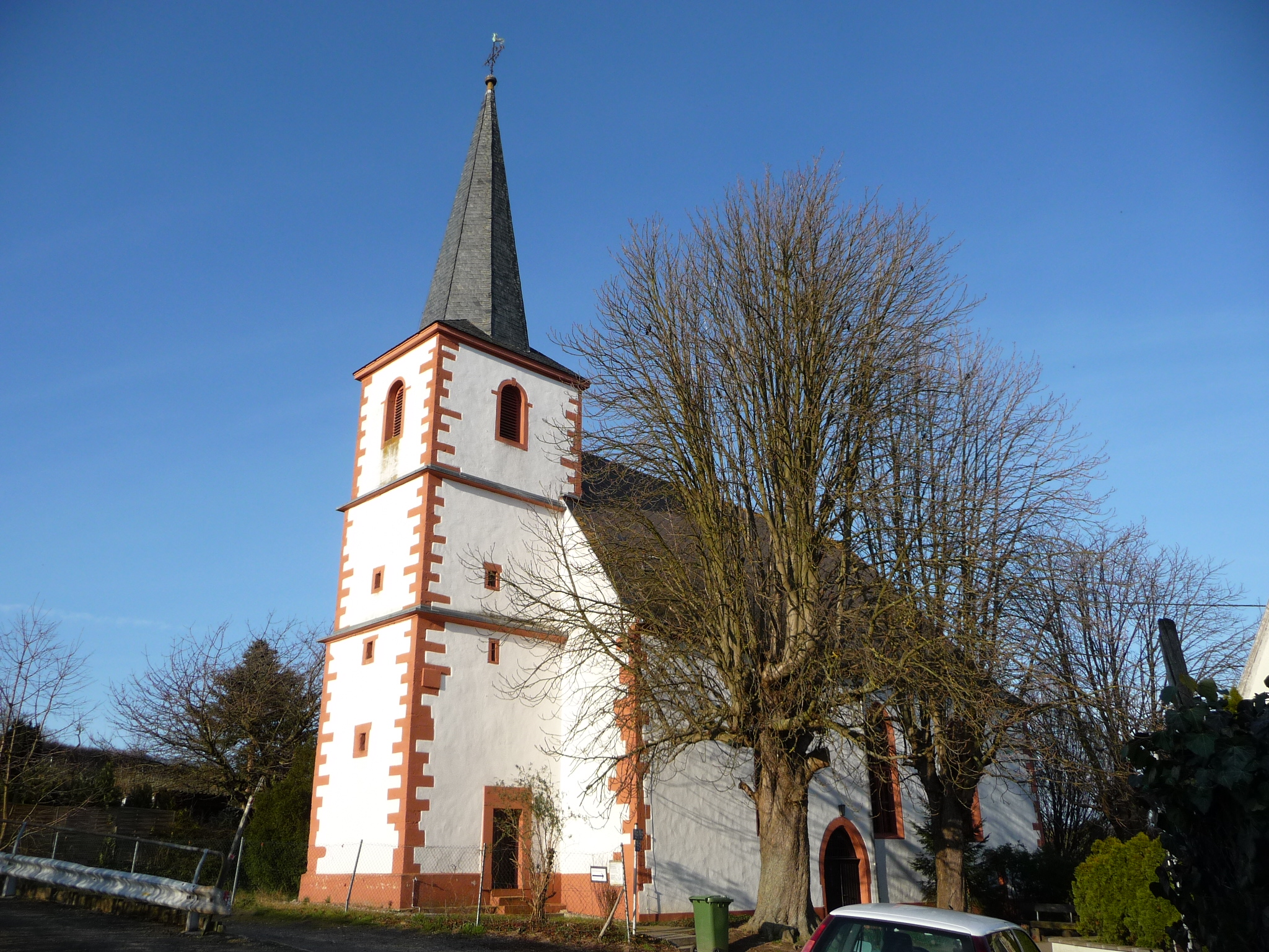 Mölsheim in Rheinland-Pfalz